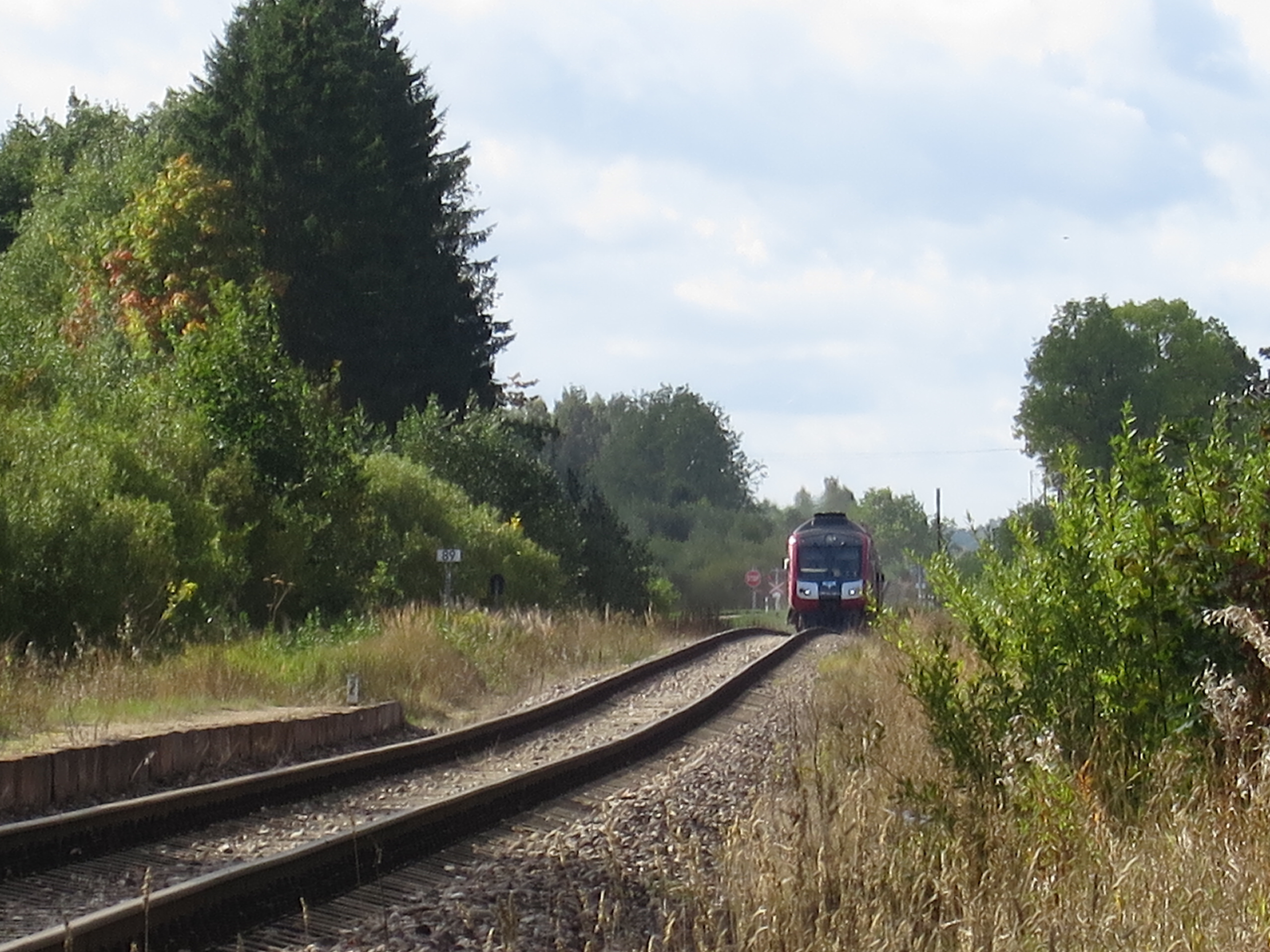 Bijusī Elstes dzelzceļa pietura, tuvojas vilciens no Rīgas